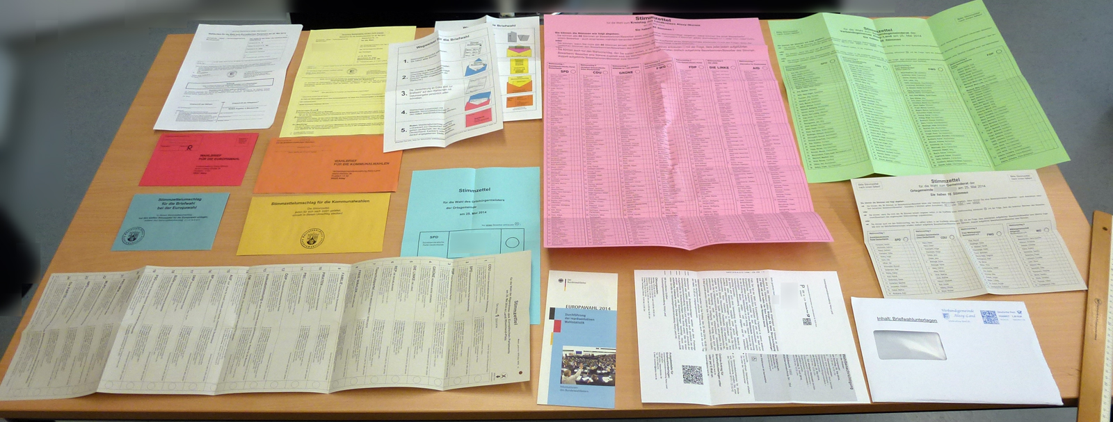 Briefwahlunterlagen für die Europawahl in Deutschland 2014, sowie die Kommunalwahlen in Rheinland-Pfalz. Auf dem Tisch liegen, die Versicherungen an Eides statt dass die Wahlhandlung selbst vorgenommen worden sind. Die Hinweisweiszettel wie in welcher Reihenfolge die Stimmzettel in die Wahlumschläge einzulegen sind. Der große rosefarbene Wahlzettel ist für die Kreistagswahl, der grüne für den Verbandsgemeinderat der graue darunter Ortsgemeinde. Der längliche graue ist für die Europawahl. Der hellblaue für die Wahl der Ortsbürgermeisterin bzw. des Ortsgemeindebürgermeisters.